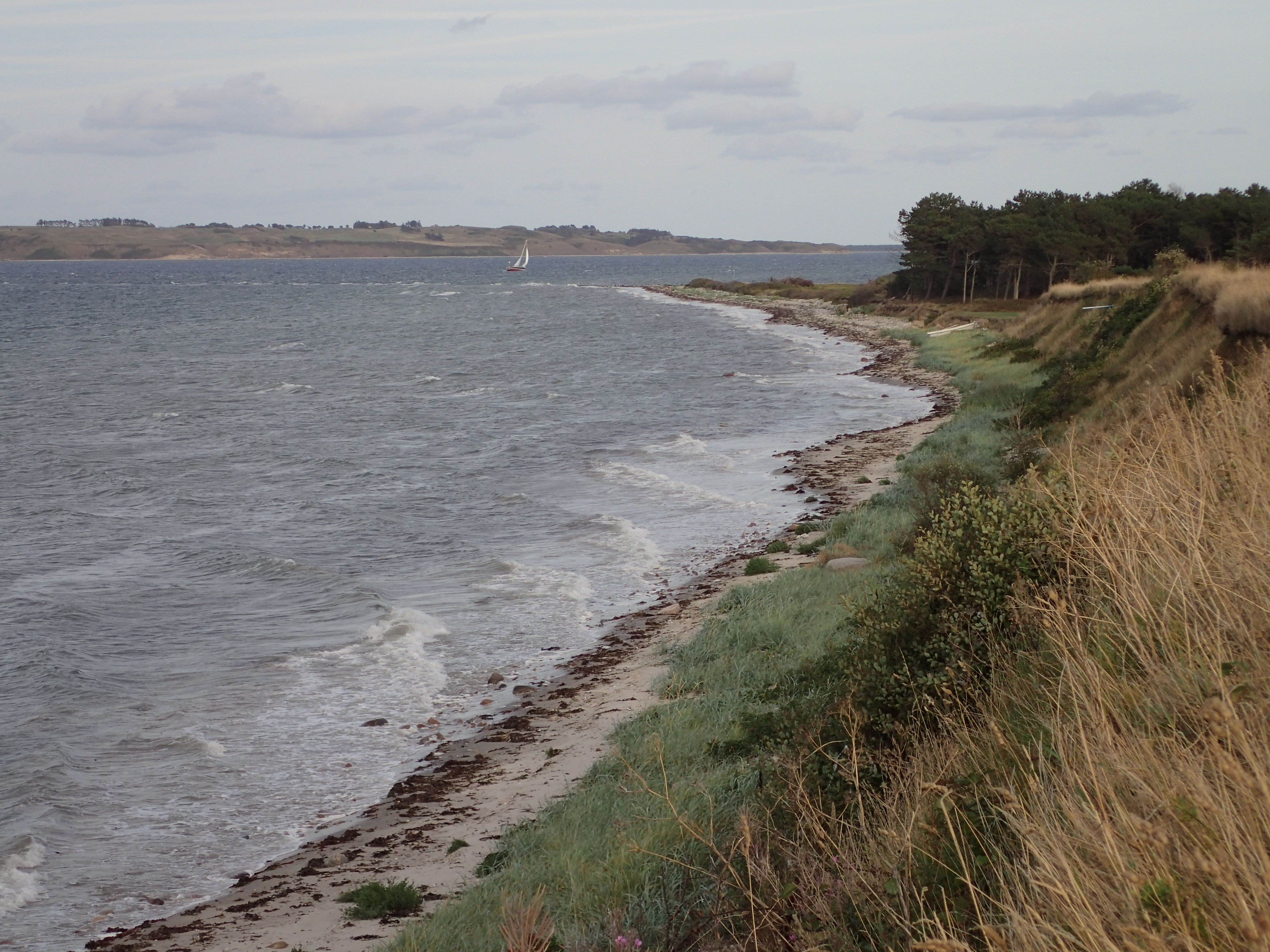 Udsigt over Revet på Tunø. Samsø i horisonten.